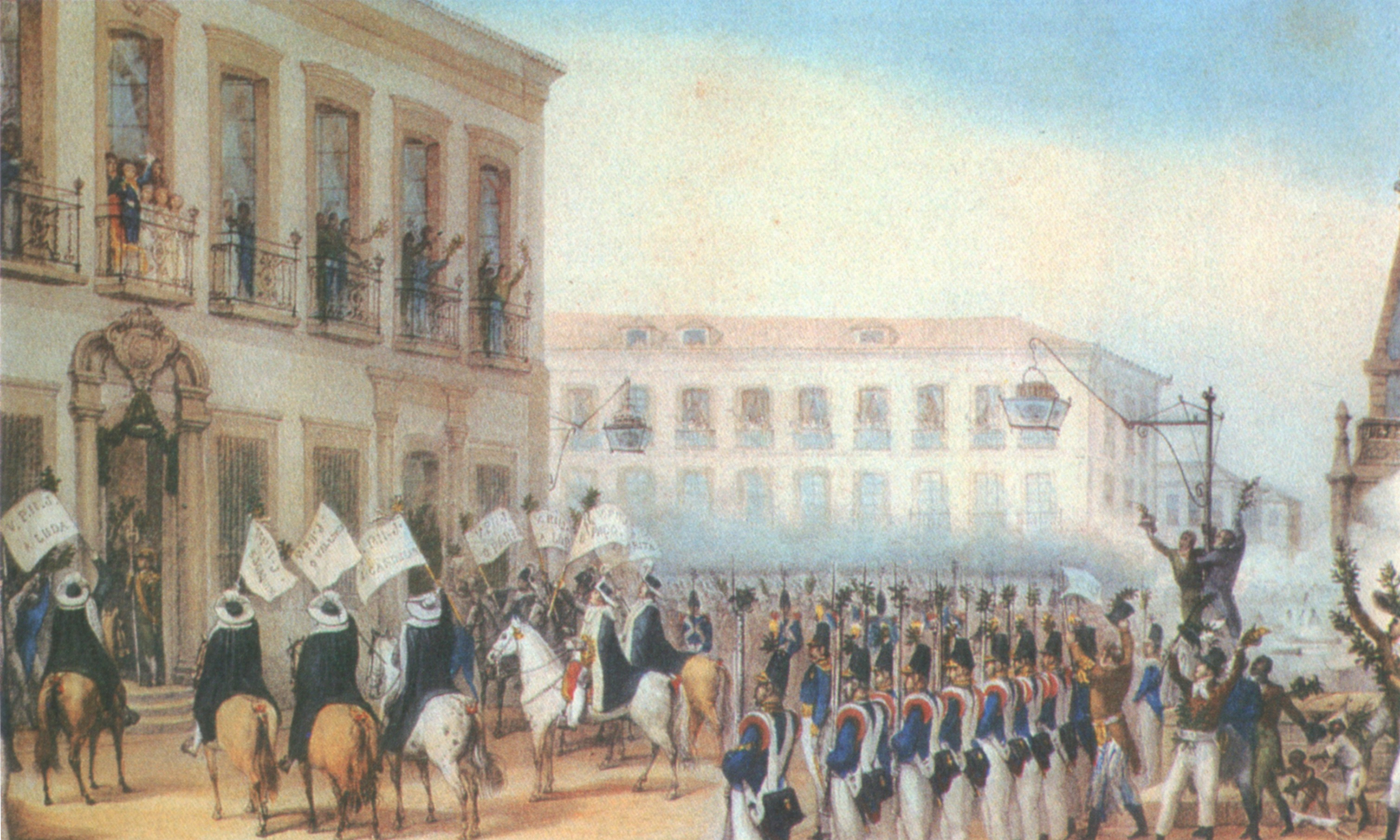 Aclamação do jovem Pedro II como Imperador do Brasil, após a Abdicação de D. Pedro I, a 9 de abril de 1831.